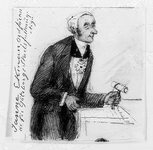 Janne Ekman (1815-1908). Penna och bläck, akvarell, på papper. Mått 10,9 x 10,5 cm Passepartout 55 x 42 cm